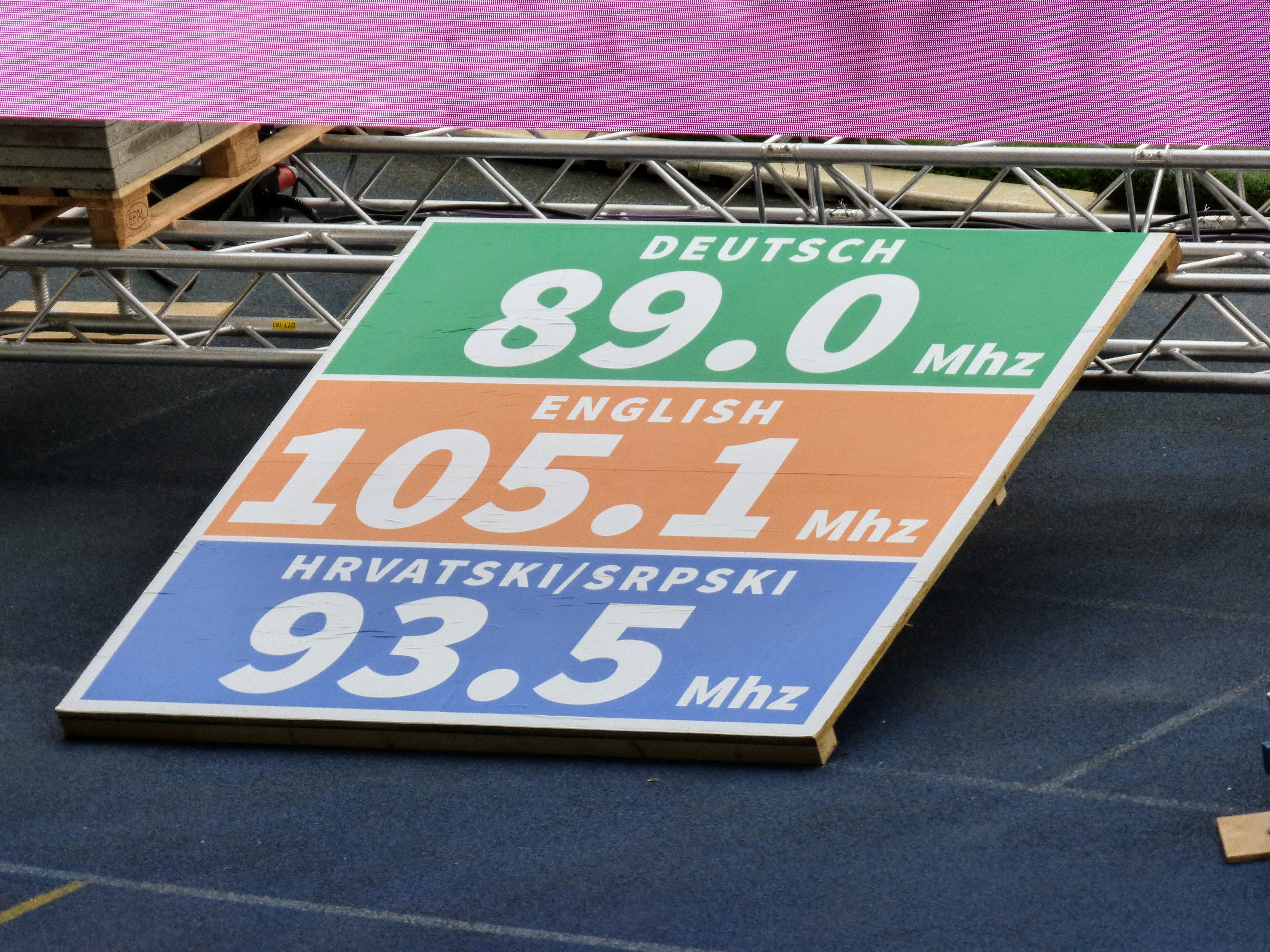 Hinweis auf Veranstaltungsradio beim Bibelkongress der Zeugen Jehovas im Wiener Ernst-Happel-Stadion 2017